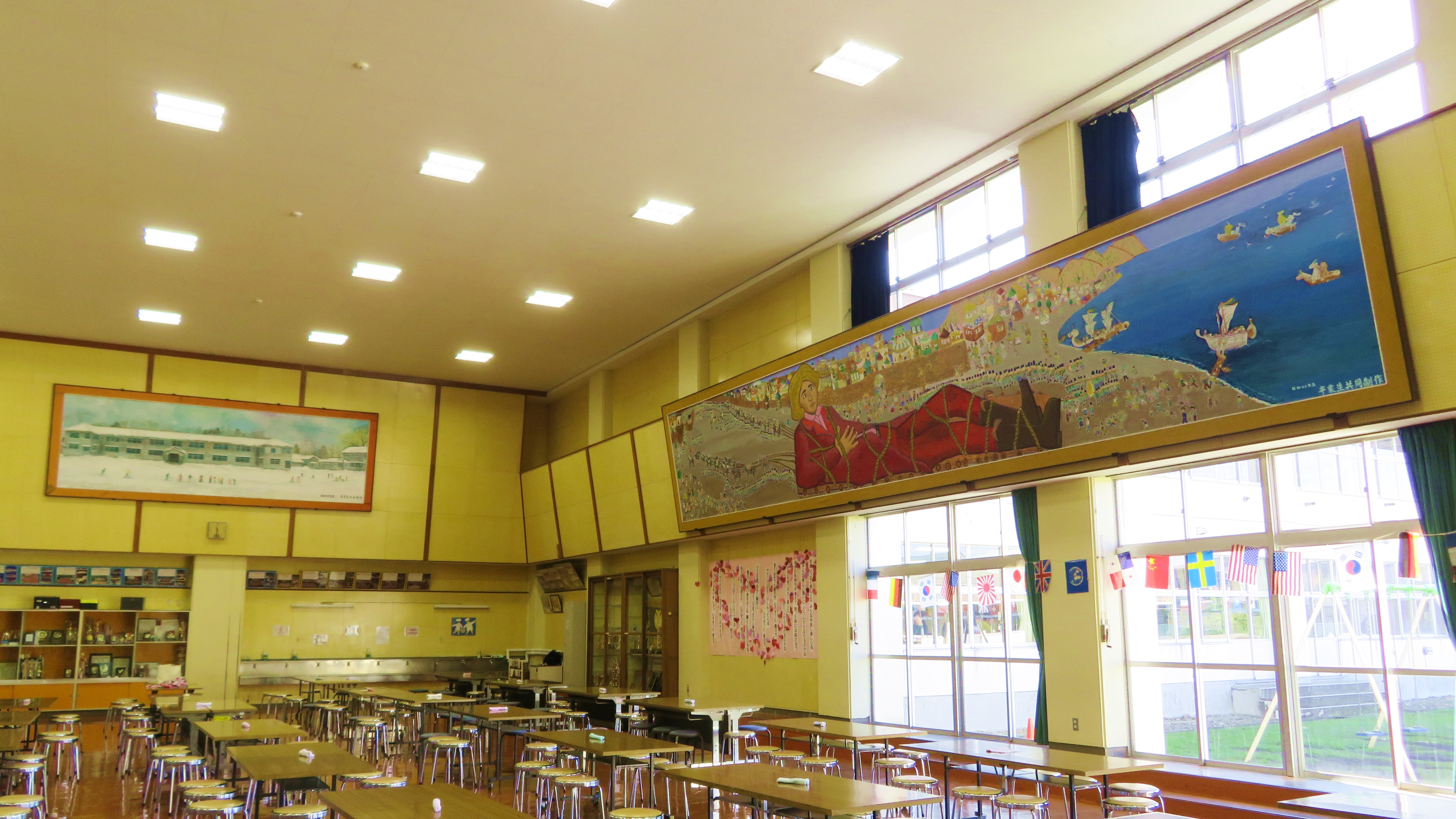 北秋田市立鷹巣小学校のランチルーム Canon PowerShot SX720 HS